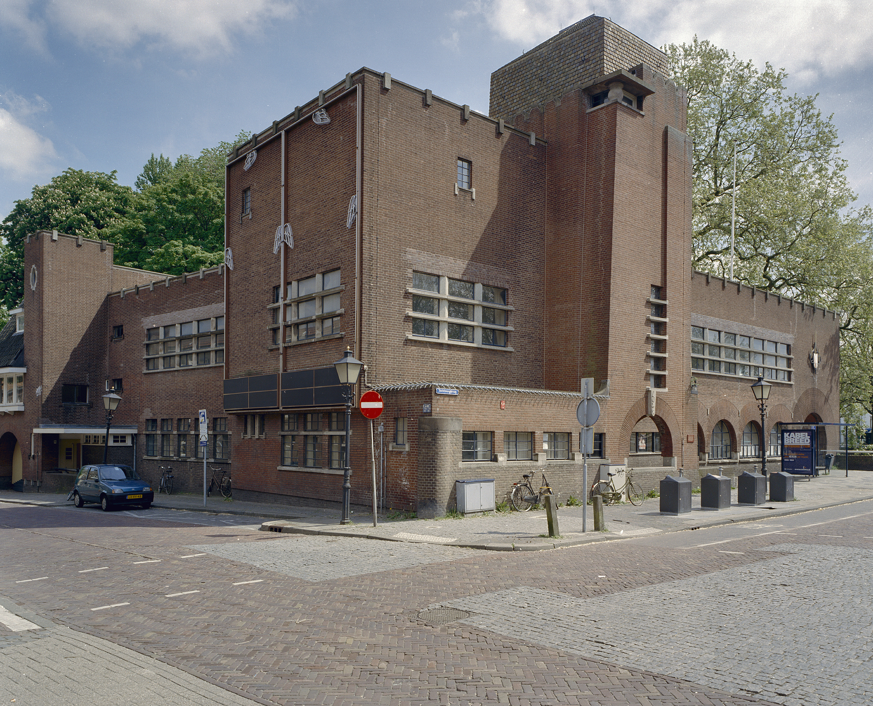 Voormalig Politiebureau Tolsteeg: Overzicht